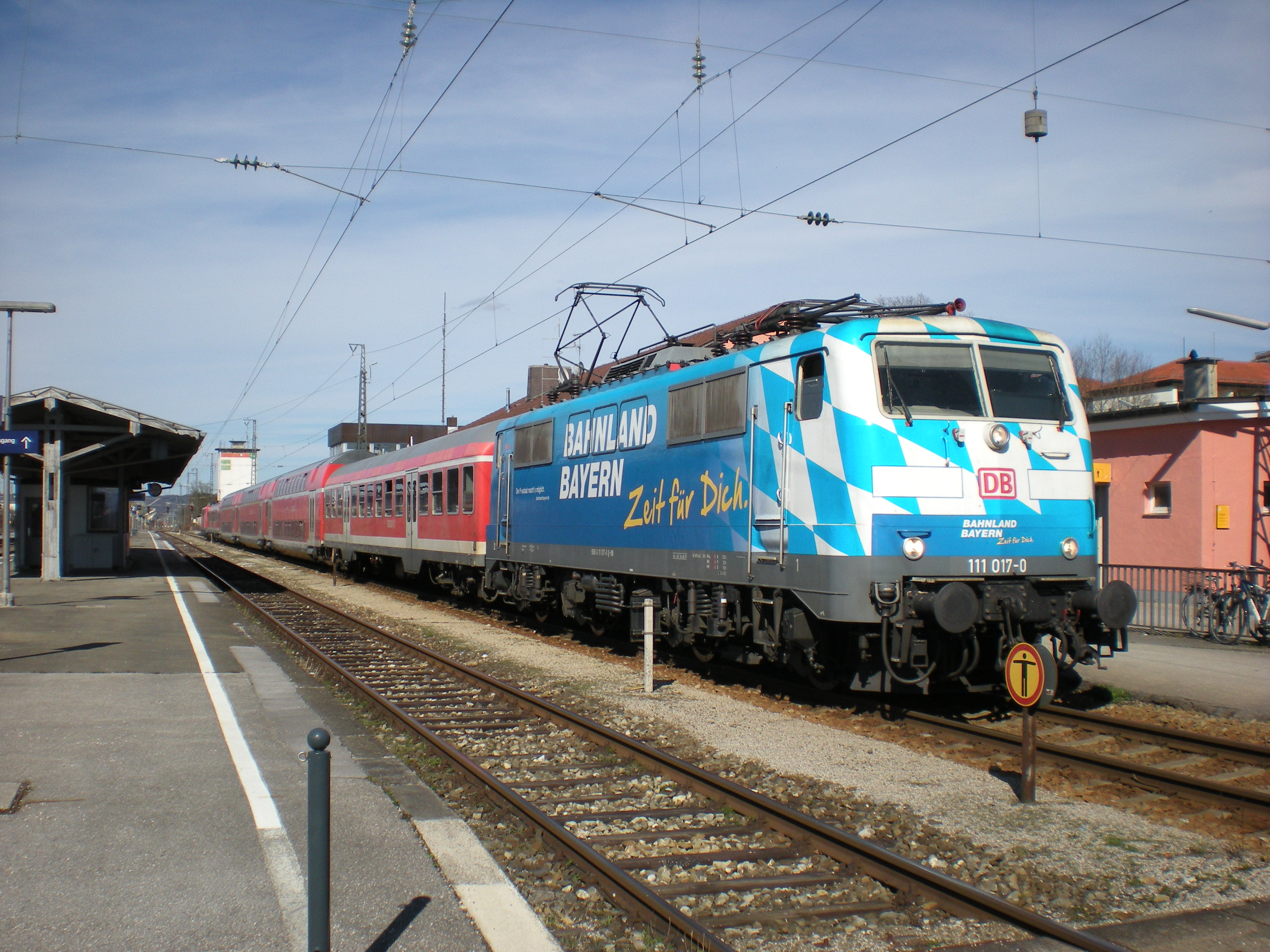 Regionalbahn nach Mittenwald mit 111 als Werbelok für das Bahnland Bayern am Bahnhof Weilheim